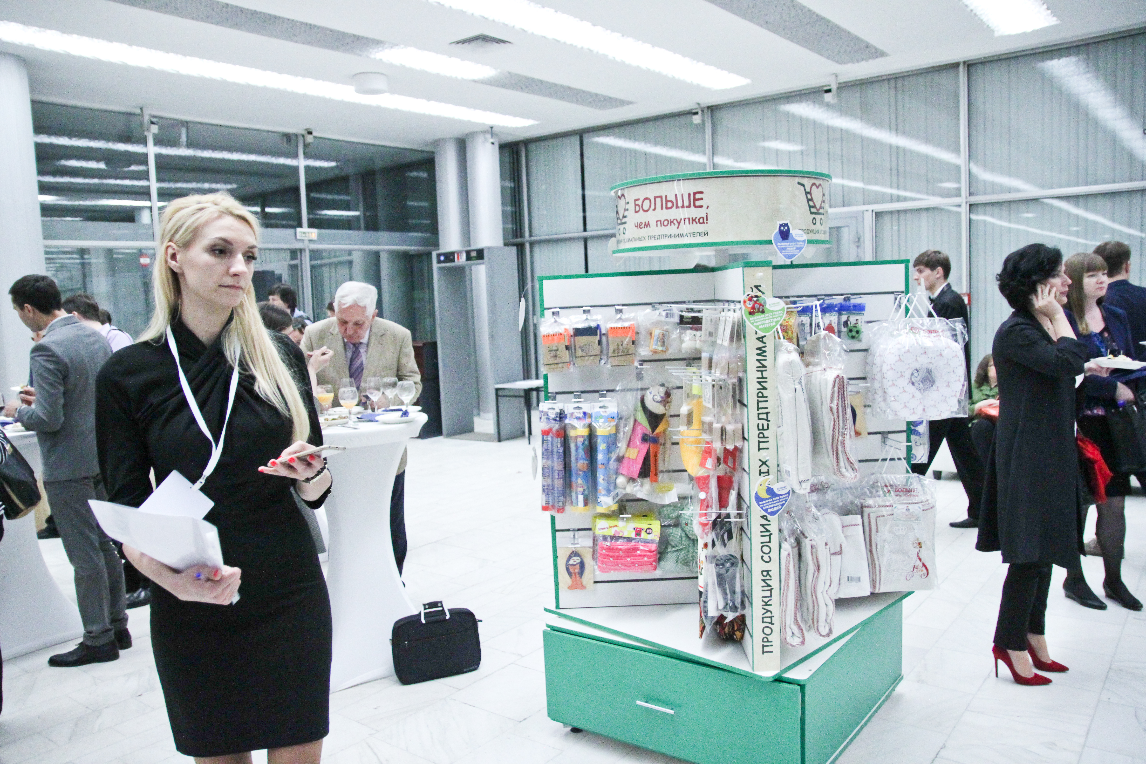 Церемония вручения премии "Импульс добра" в области социального предпринимательства в концертном зале Правительства Москвы, 17 мая 2016